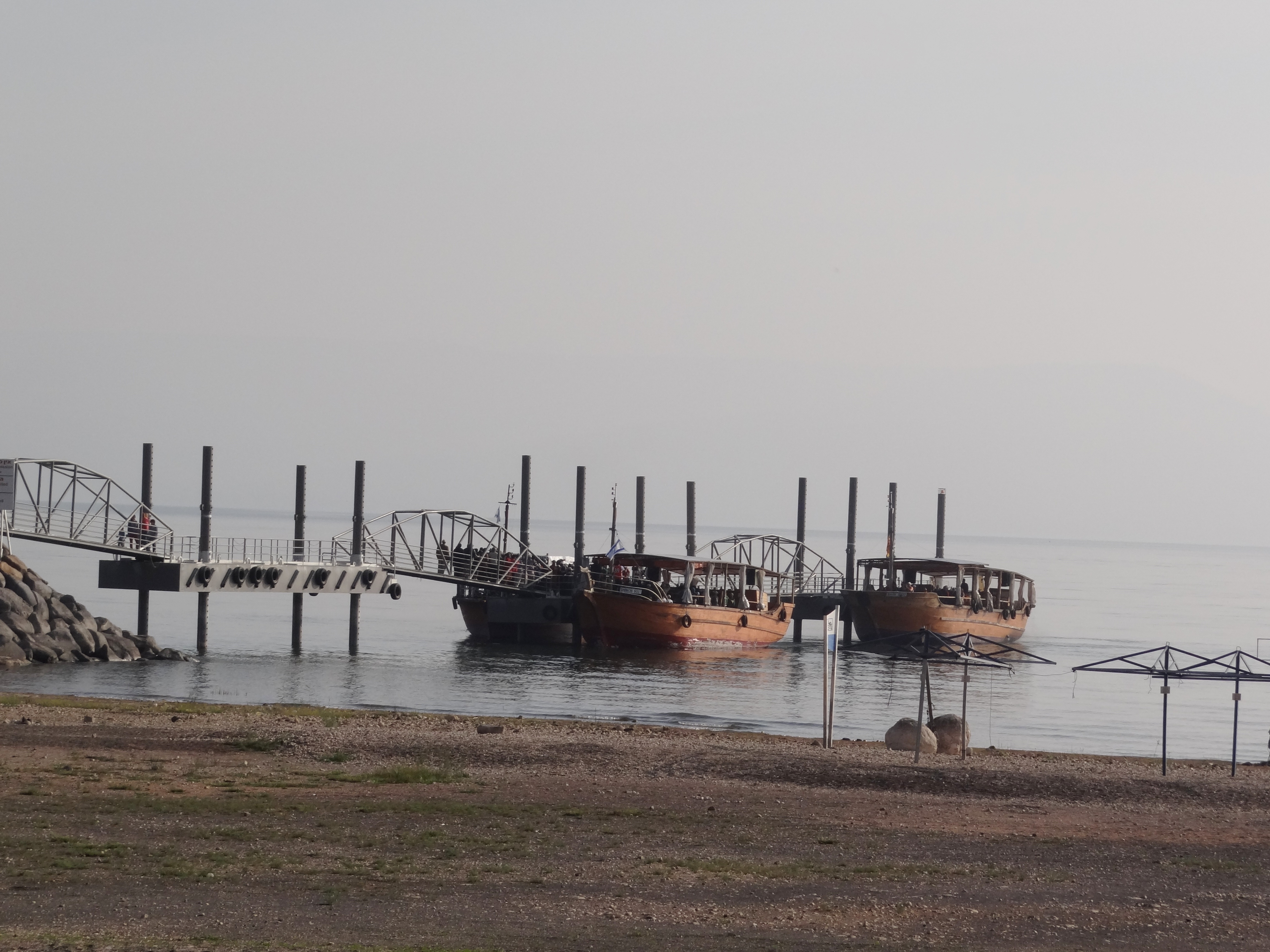 חוף גינוסר